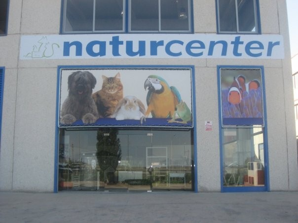 FAÇANA DE NATUR CENTER